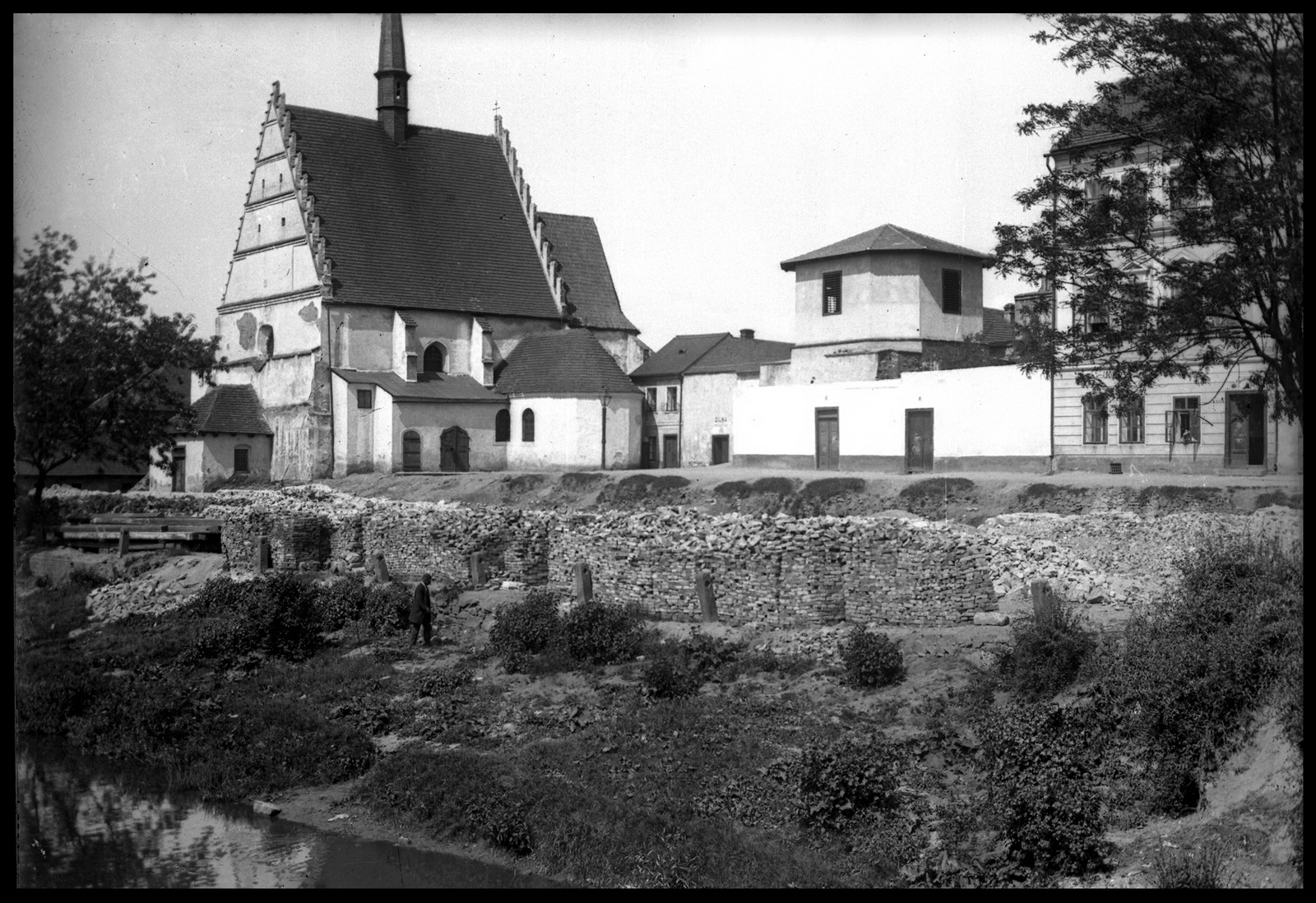 Pardubice, kostel sv. Bartoloměje s Černou kaplí a zvonicí. V popředí je patrný stavební materiál ze zbořených vojenských stájí, které stály na břehu vodního kanálu.